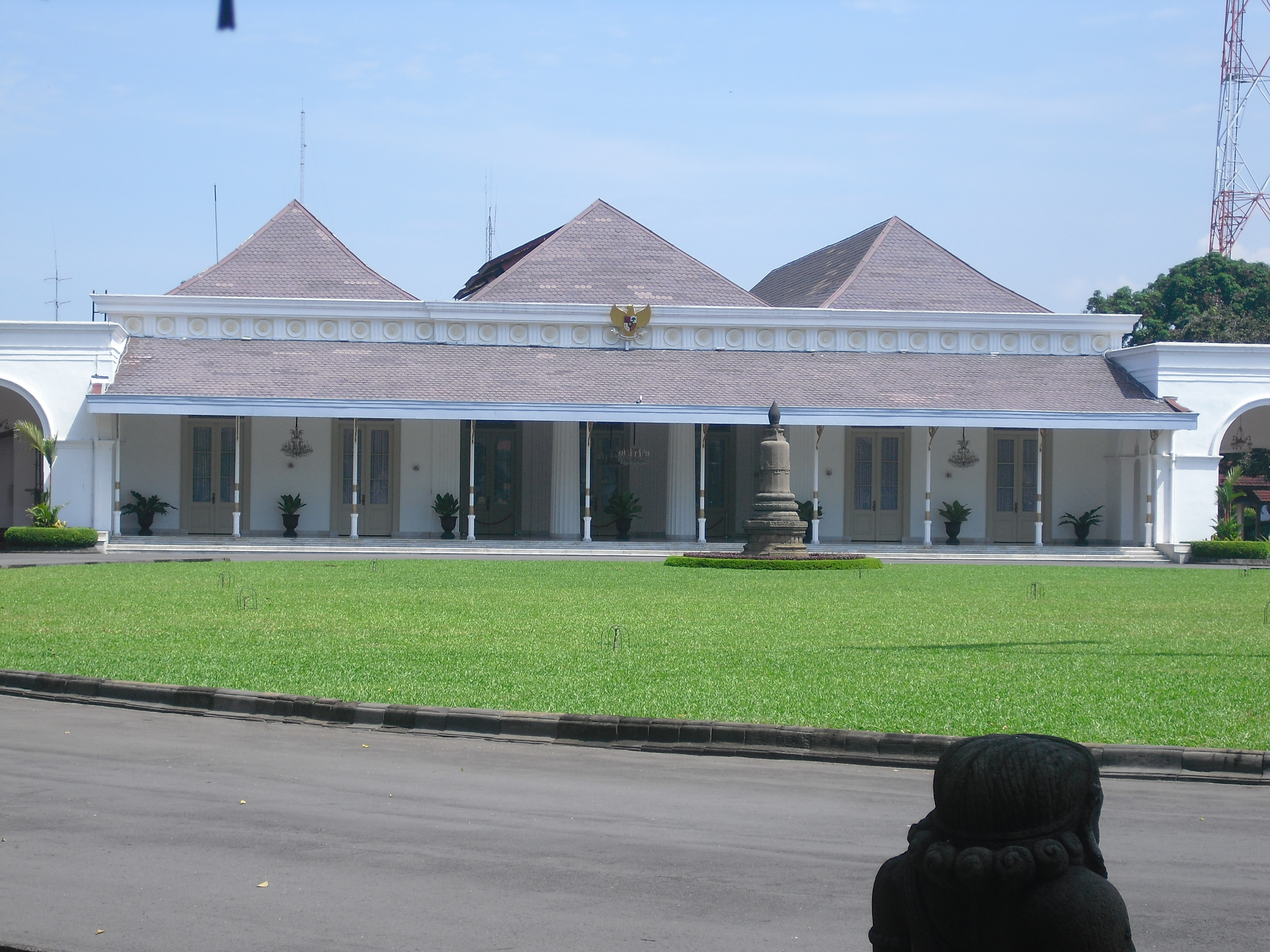 Gedung Agung Istana Yogyakarta